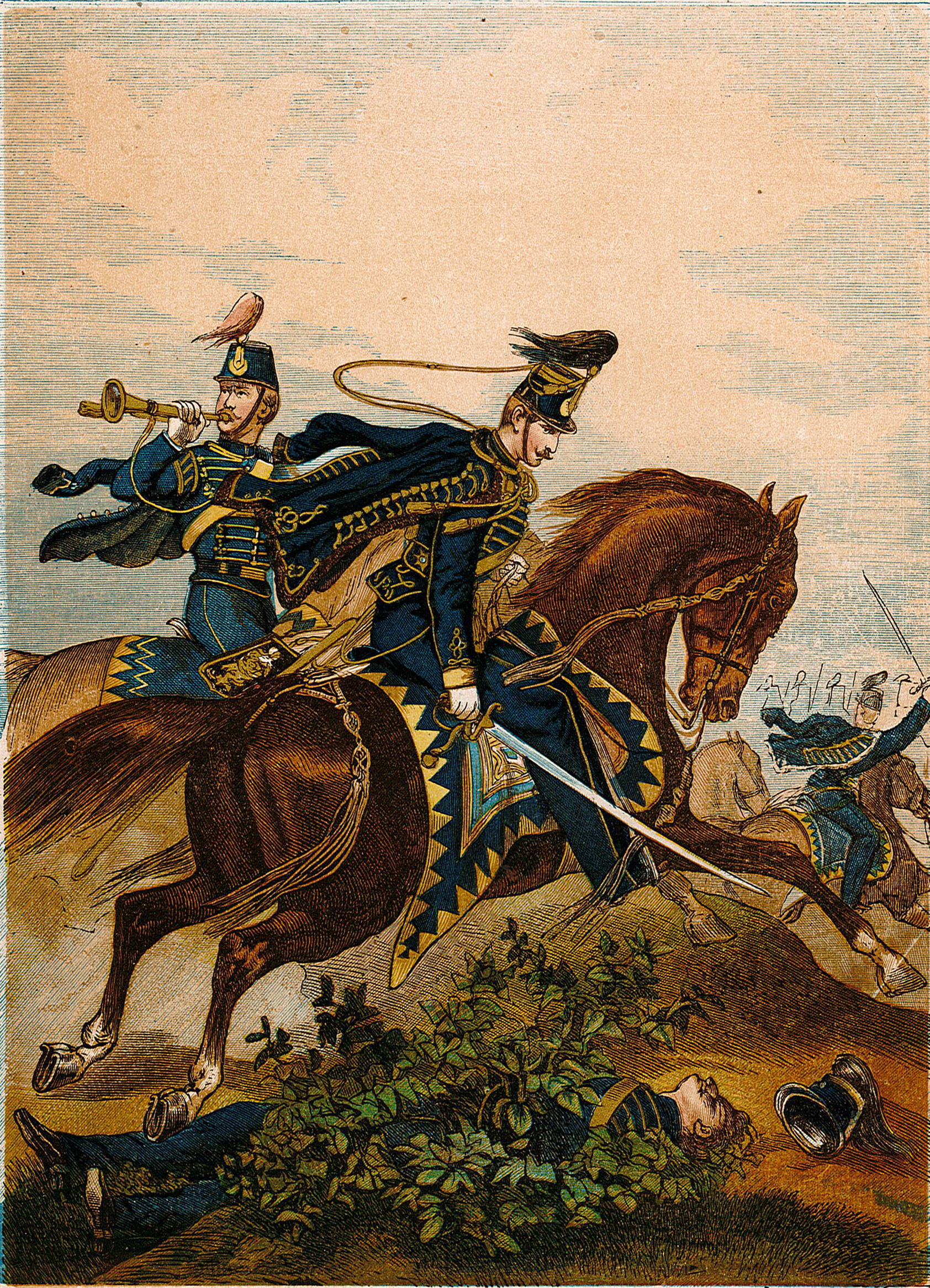 Uniformer för ”Husar-Regementet Konung Carl XV.”